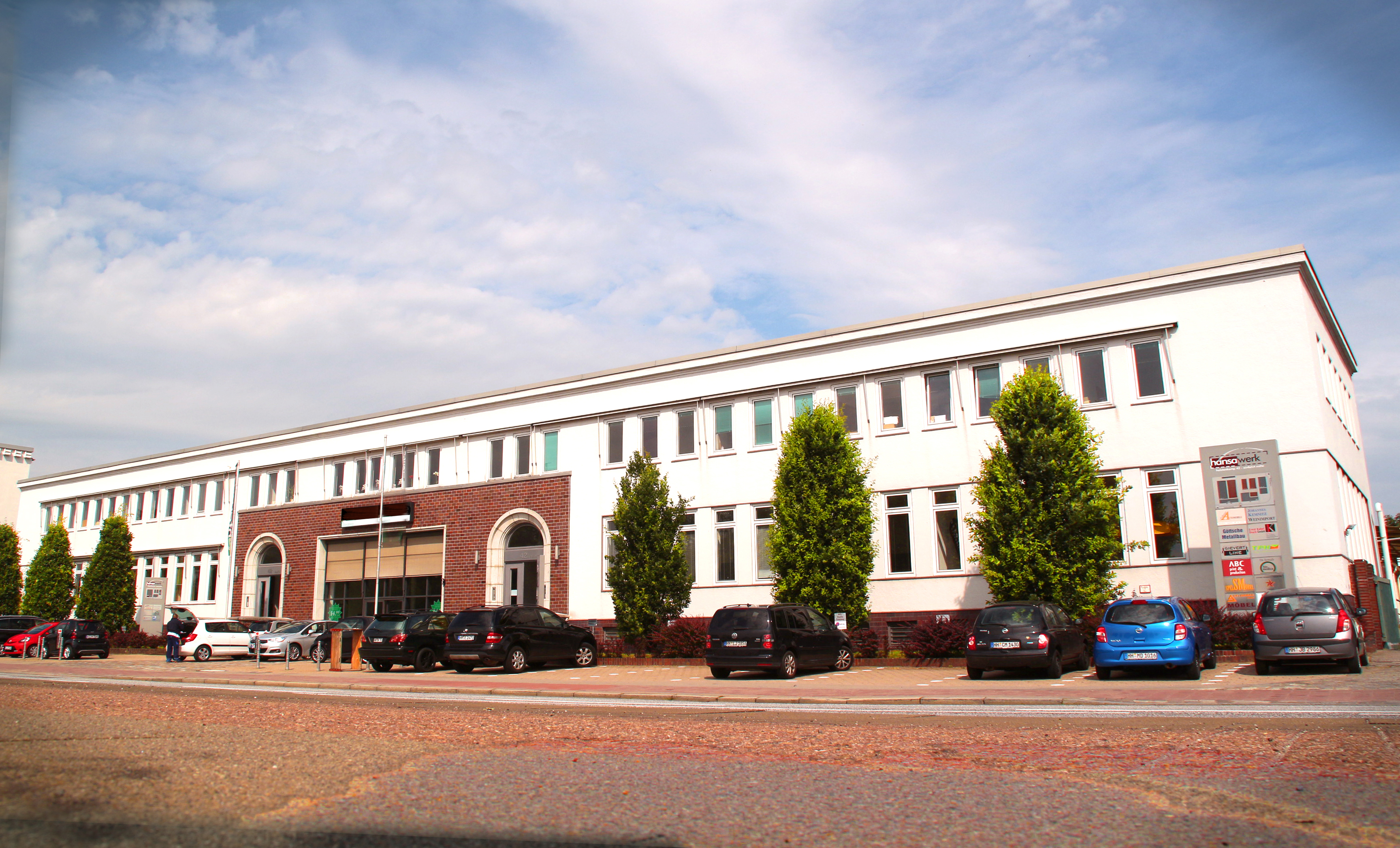 Hamburg Records Office in Hamburg, Germany, 2012